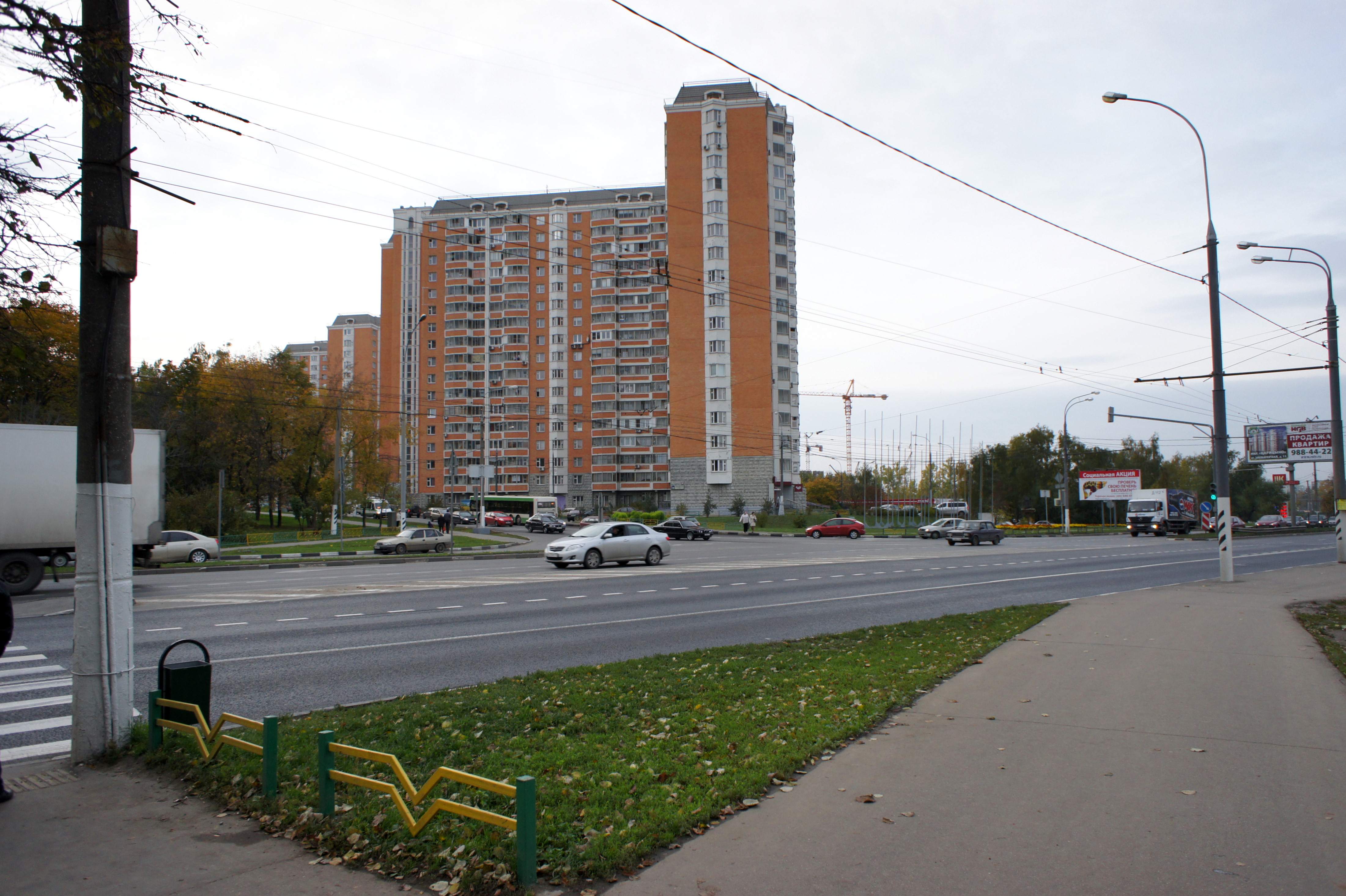 Пересечение Элеваторной и Липецкой улиц.